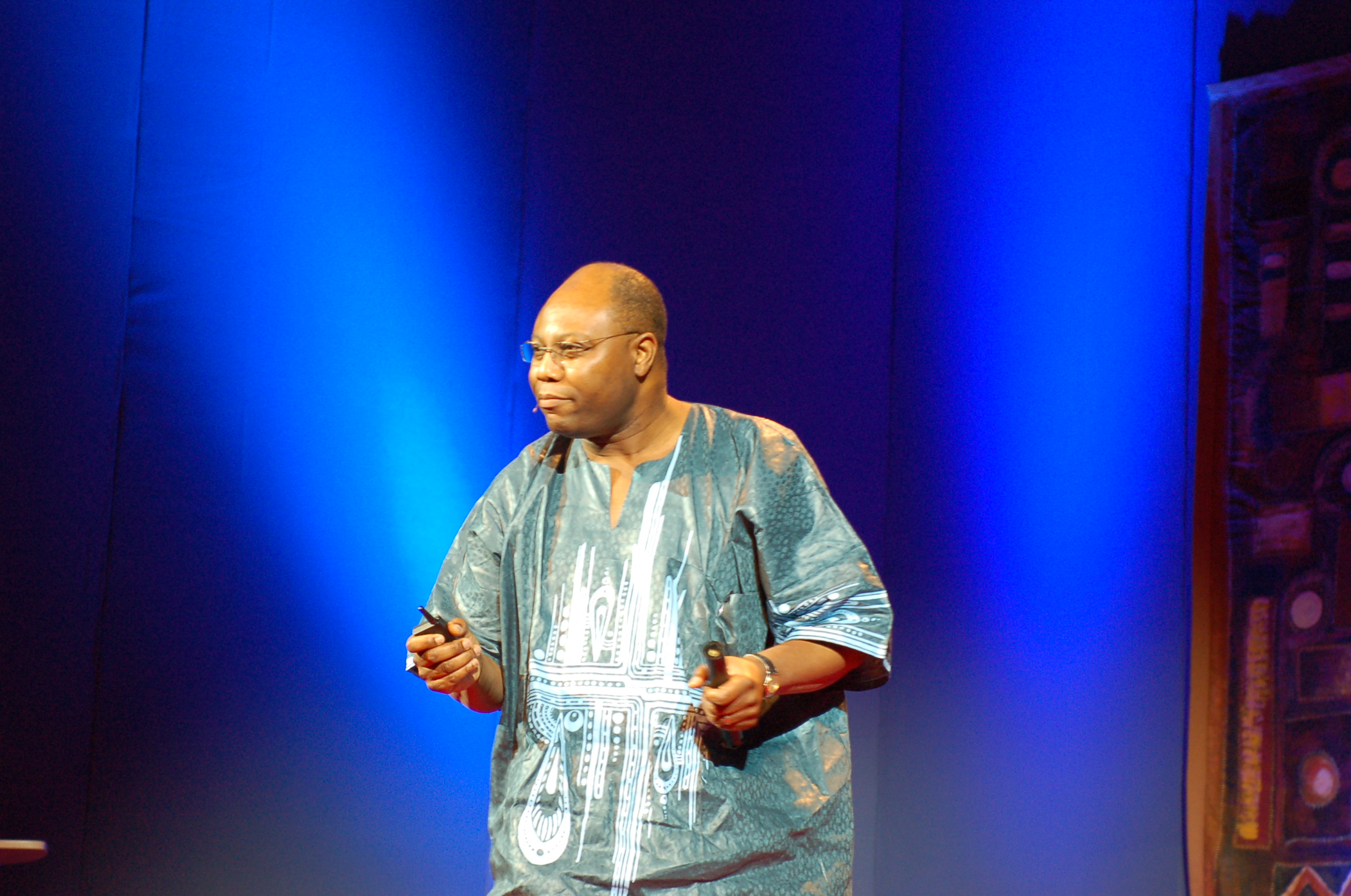 Seyi Oyesola